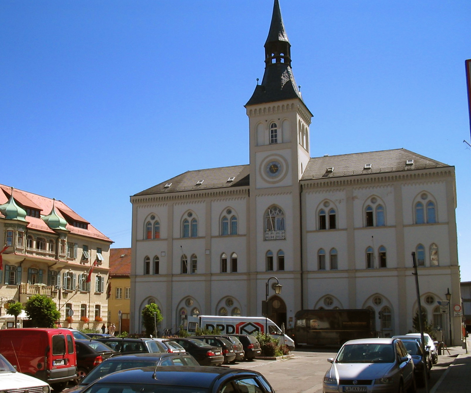 Cityhall in Pfaffenhofen